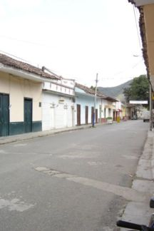 una calle de Bolívar por la tarde